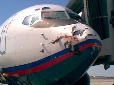 Daños producidos por impactos con aves.